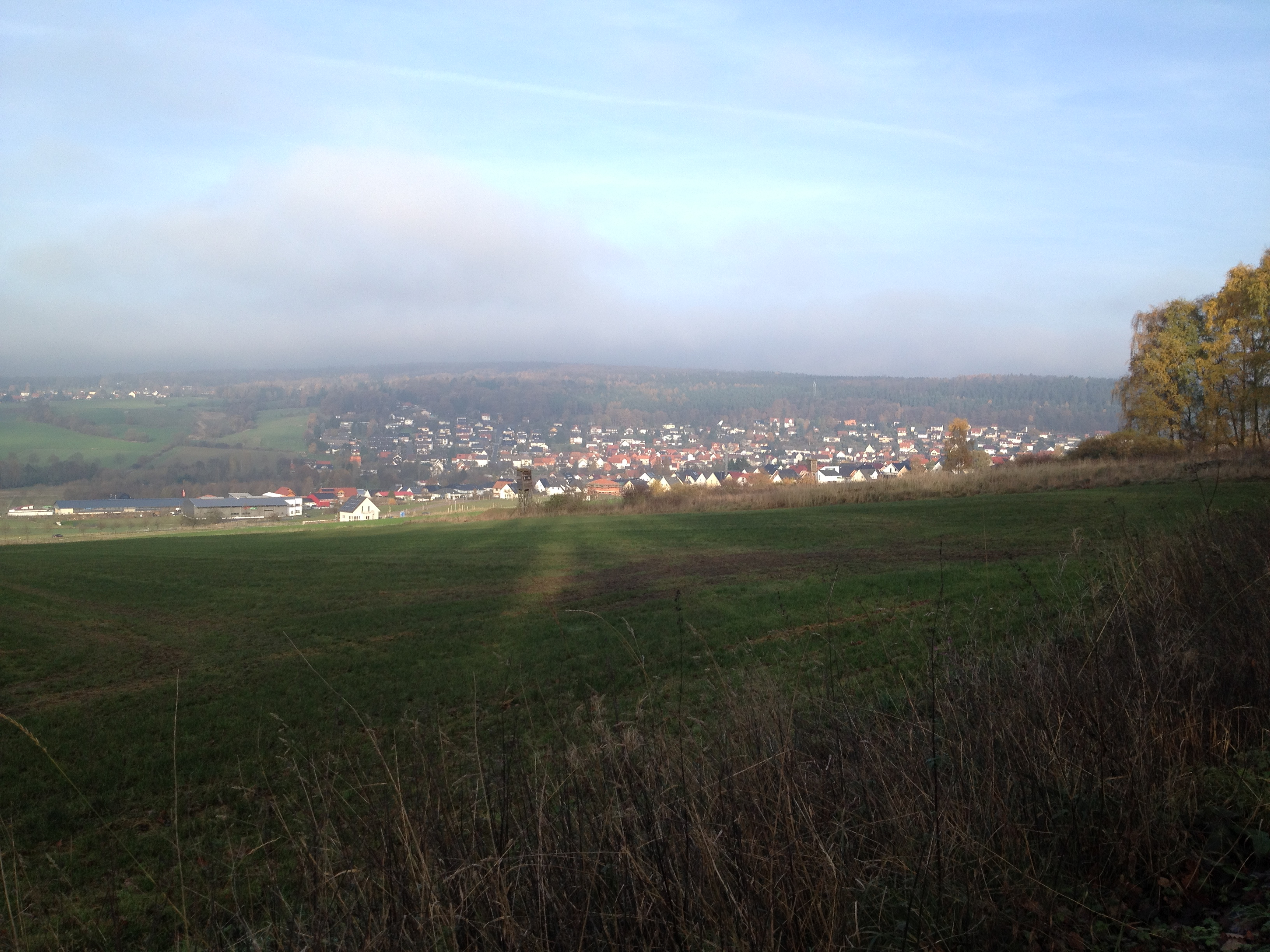 Nieste im Kaufunger Wald